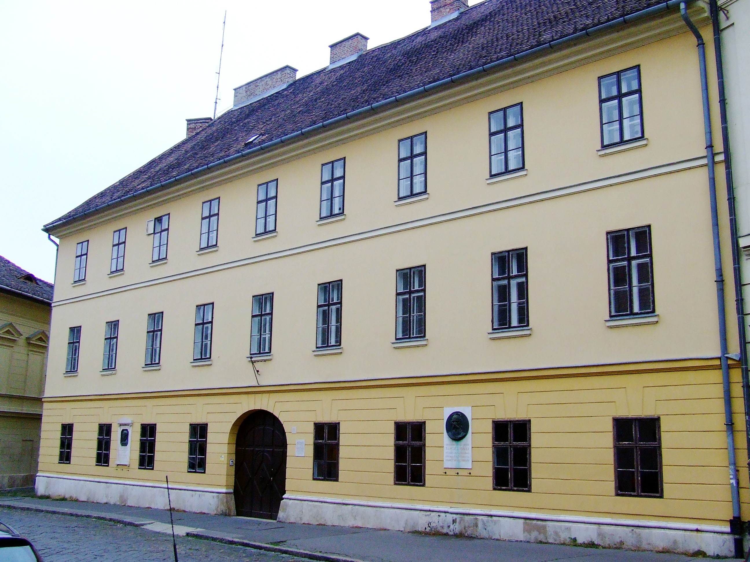 Táncsics Mihály és Kossuth Lajos volt börtönének épülete a budai várban